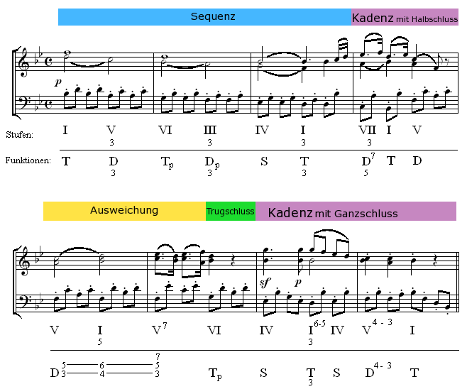 Stufentheorie – Beispiel einer Analyse